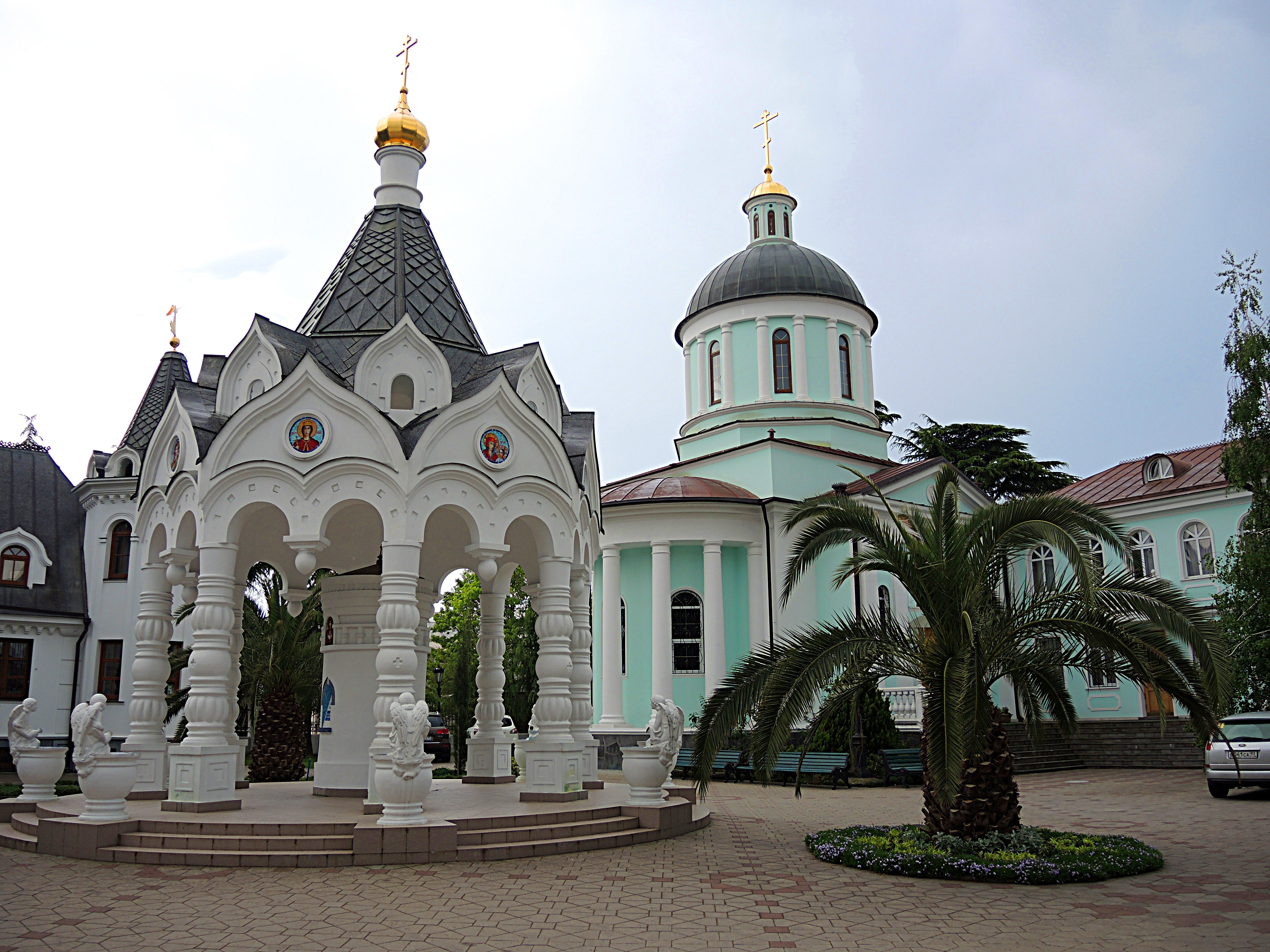 Собор Михайла Архангела с интерьером: улица Москвина, 12, Центральный район, Сочи, Краснодарский край